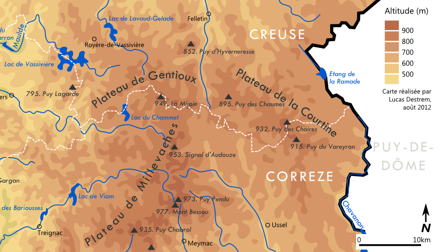 Localisation des plateaux de Millevaches, Gentioux et la Courtine au sein du Limousin (France).